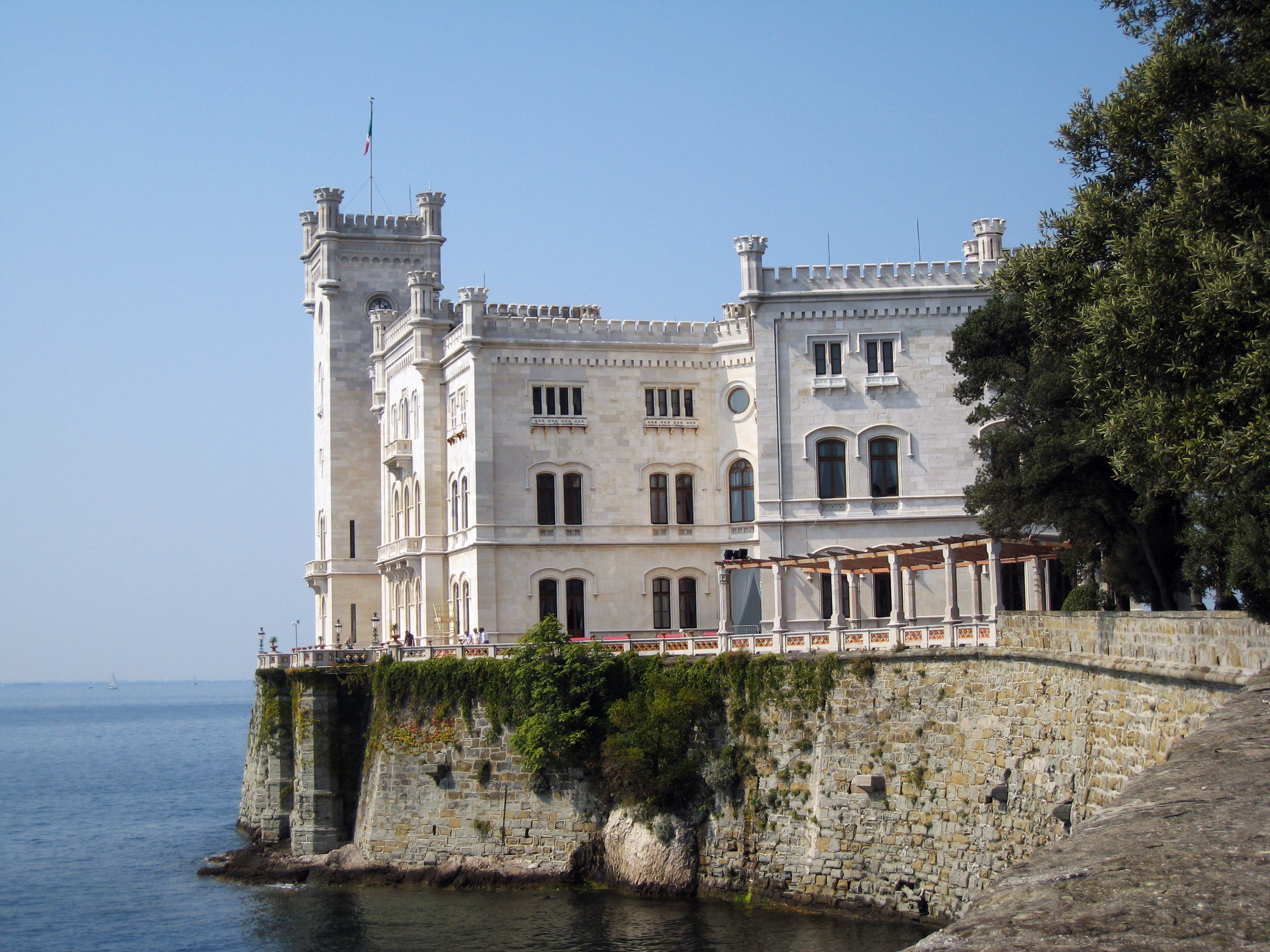 La foto rappresenta il castello di Miramare (Trieste)